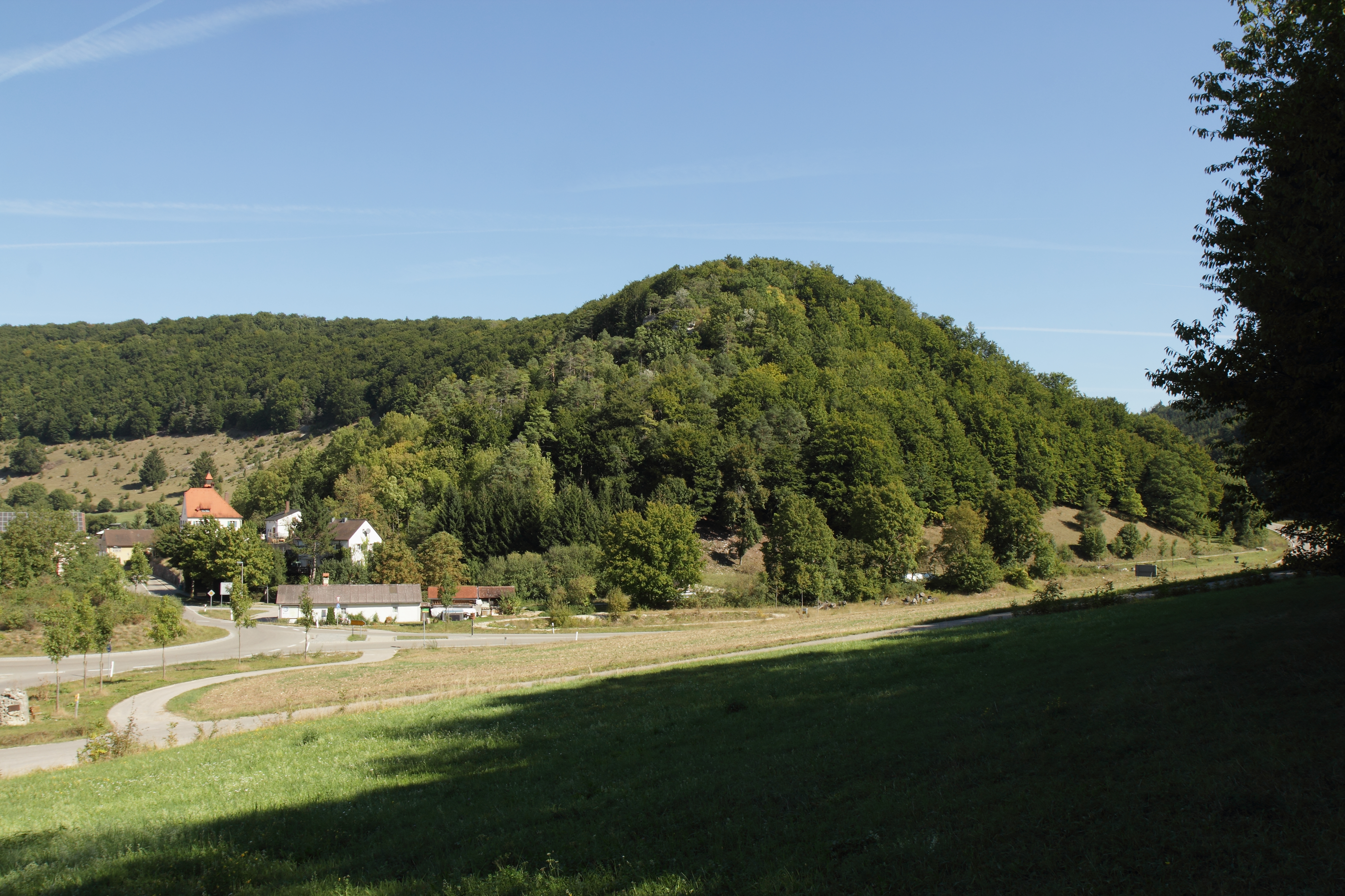 Burgstall Zimmern - Ansicht aus südlicher Richtung